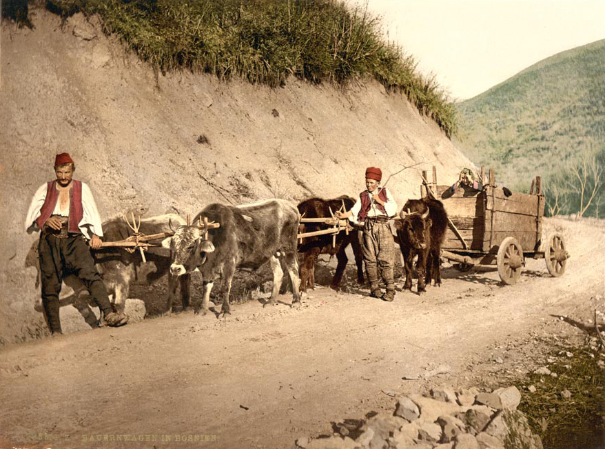 Peasant wagon Bosnia Austro-Hungary